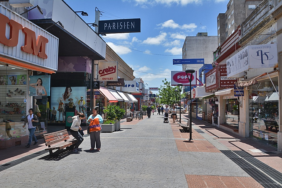 Fussgängerzone in Maldonado